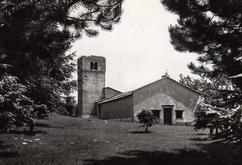 Chiesa di San Giovanni in Loffa (a Sant'Anna d'Alfaedo), in una fotografia degli anni 1960